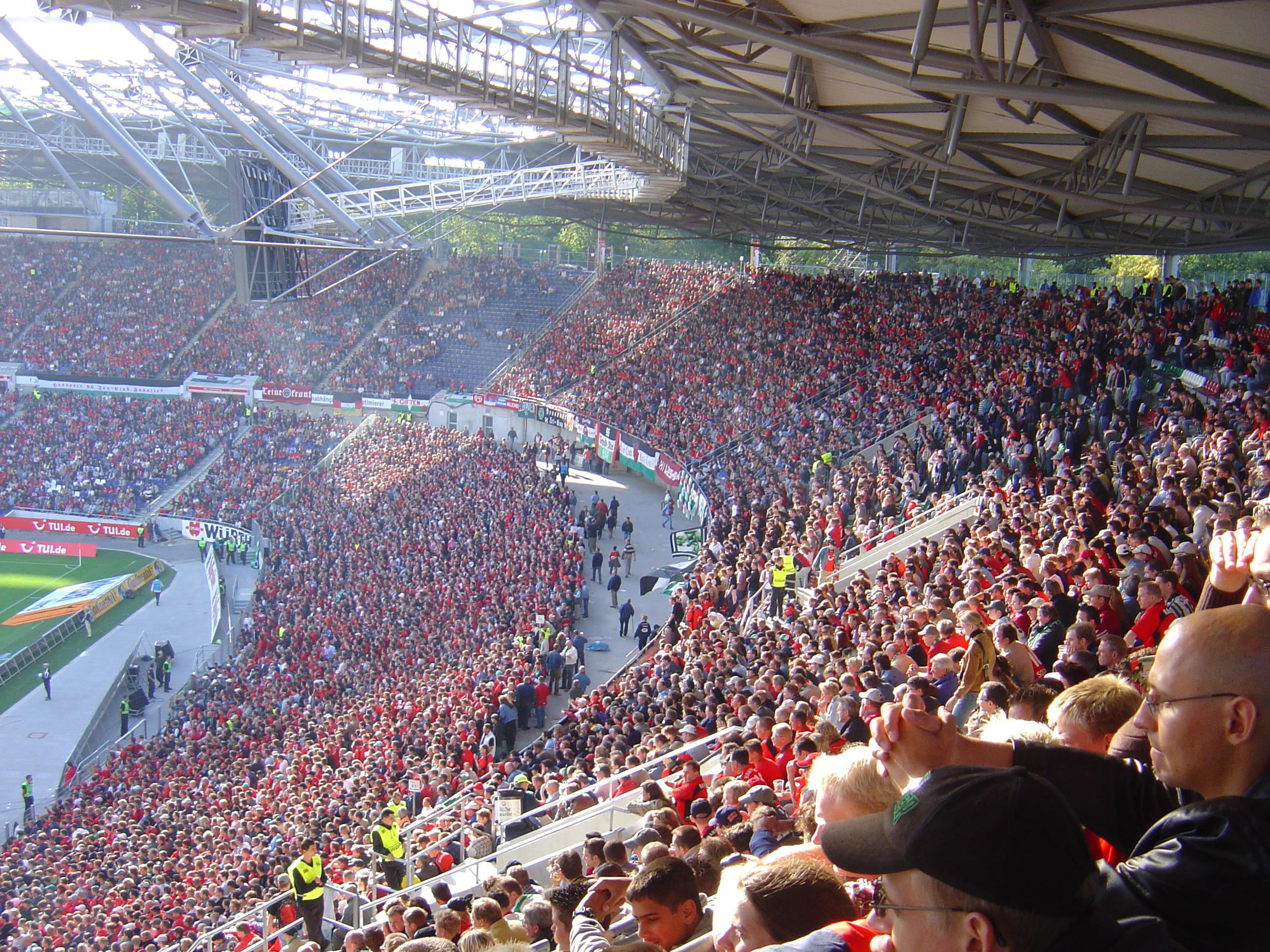 Die Nordkurve und -tribüne der AWD-Arena, die Heimat der Hannover 96-Fans